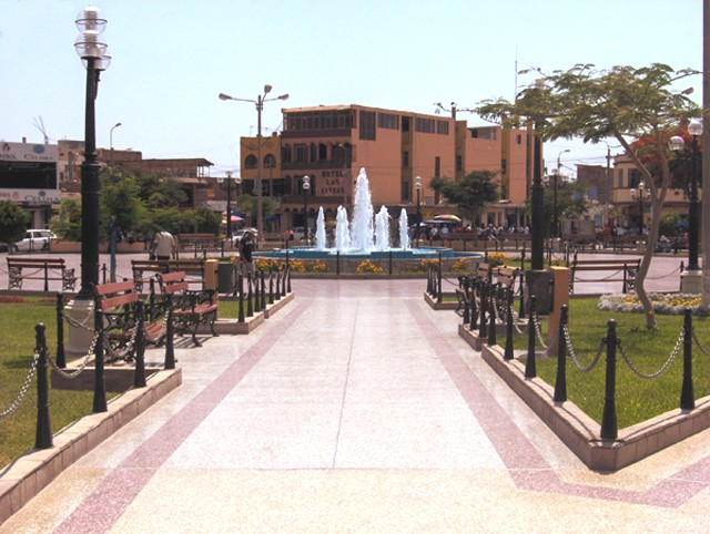 Renovada Plaza de Armas de la ciudad de Nasca (Ica-Perú)